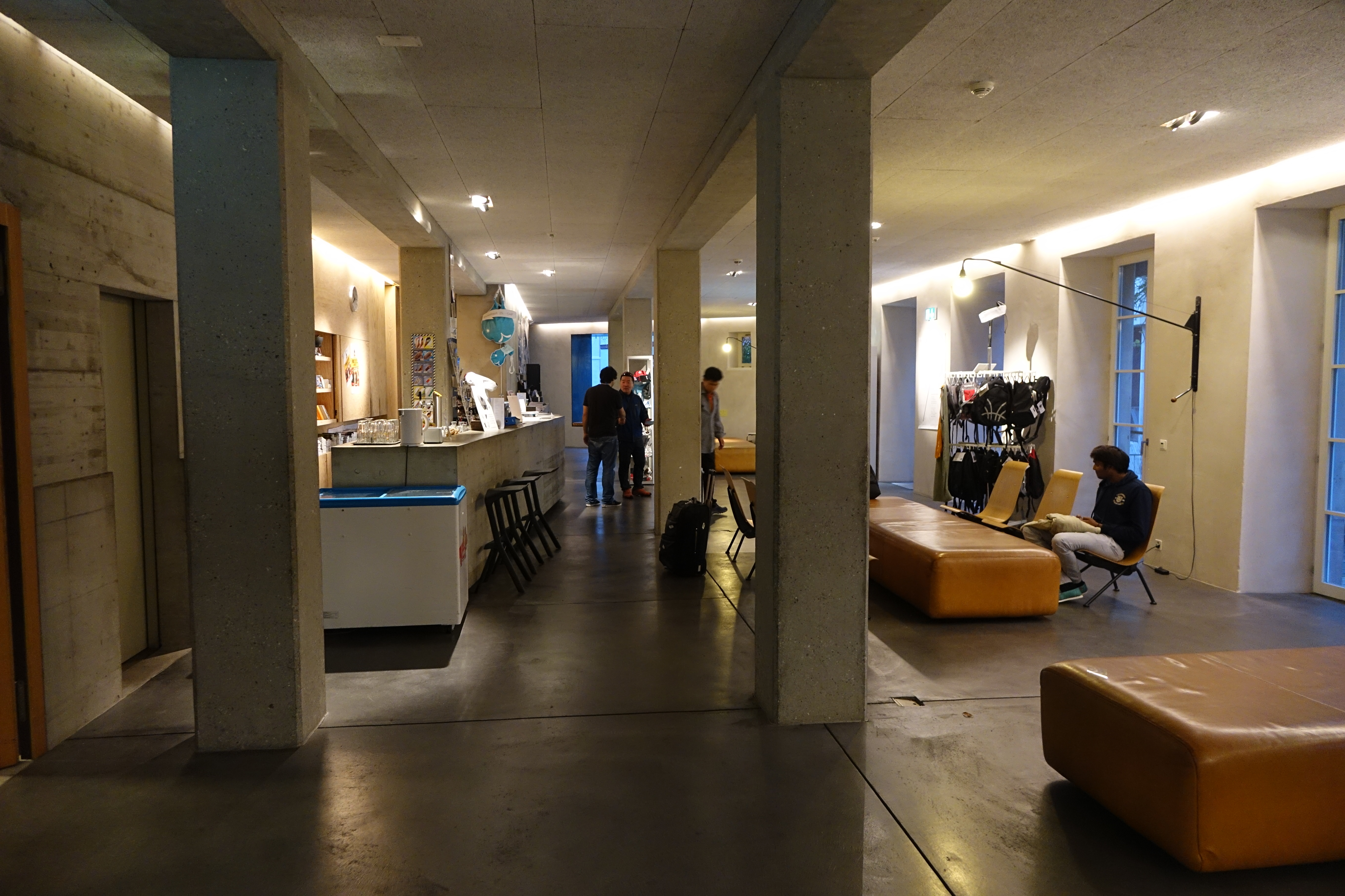 141007Jugendherberge Basel, Basel, Switzerland